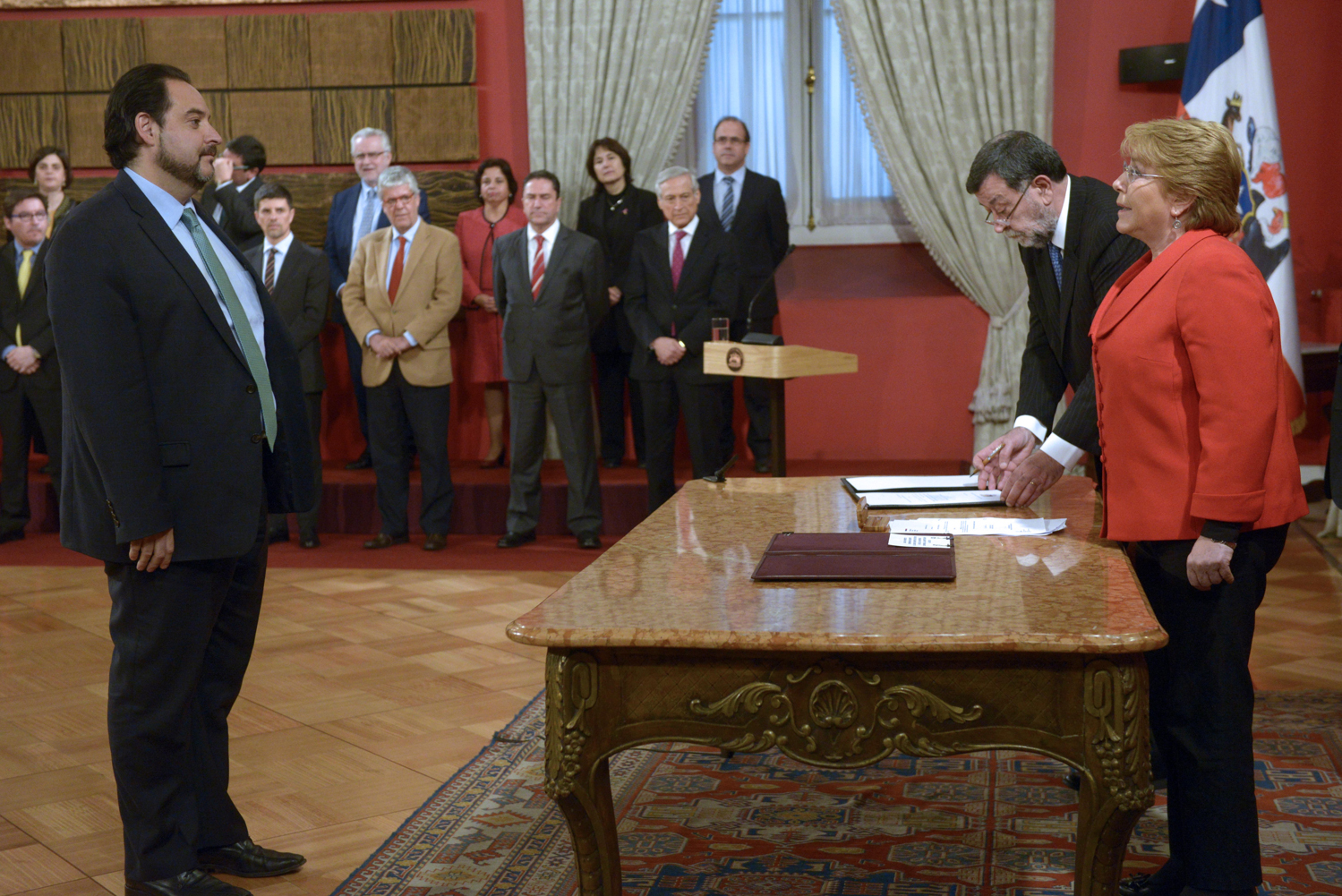 19 Octubre 2016, Ministro Marcelo Díaz participa en cambio de gabinete, luego realiza conferencia de prensa.